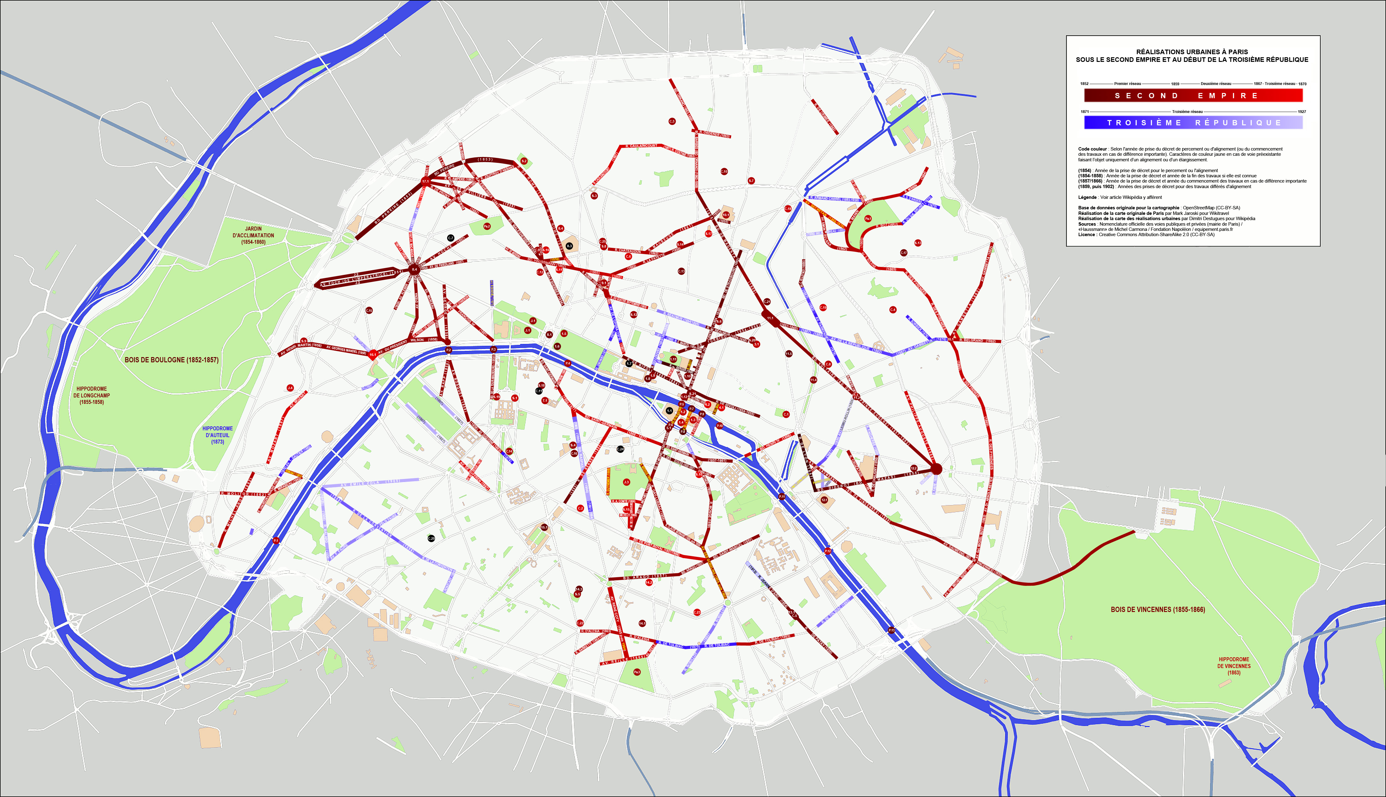 Carte des réalisations urbaines à Paris sous le Second Empire. Sur une carte originale réalisée par Mark Jaroski pour Wikitravel.